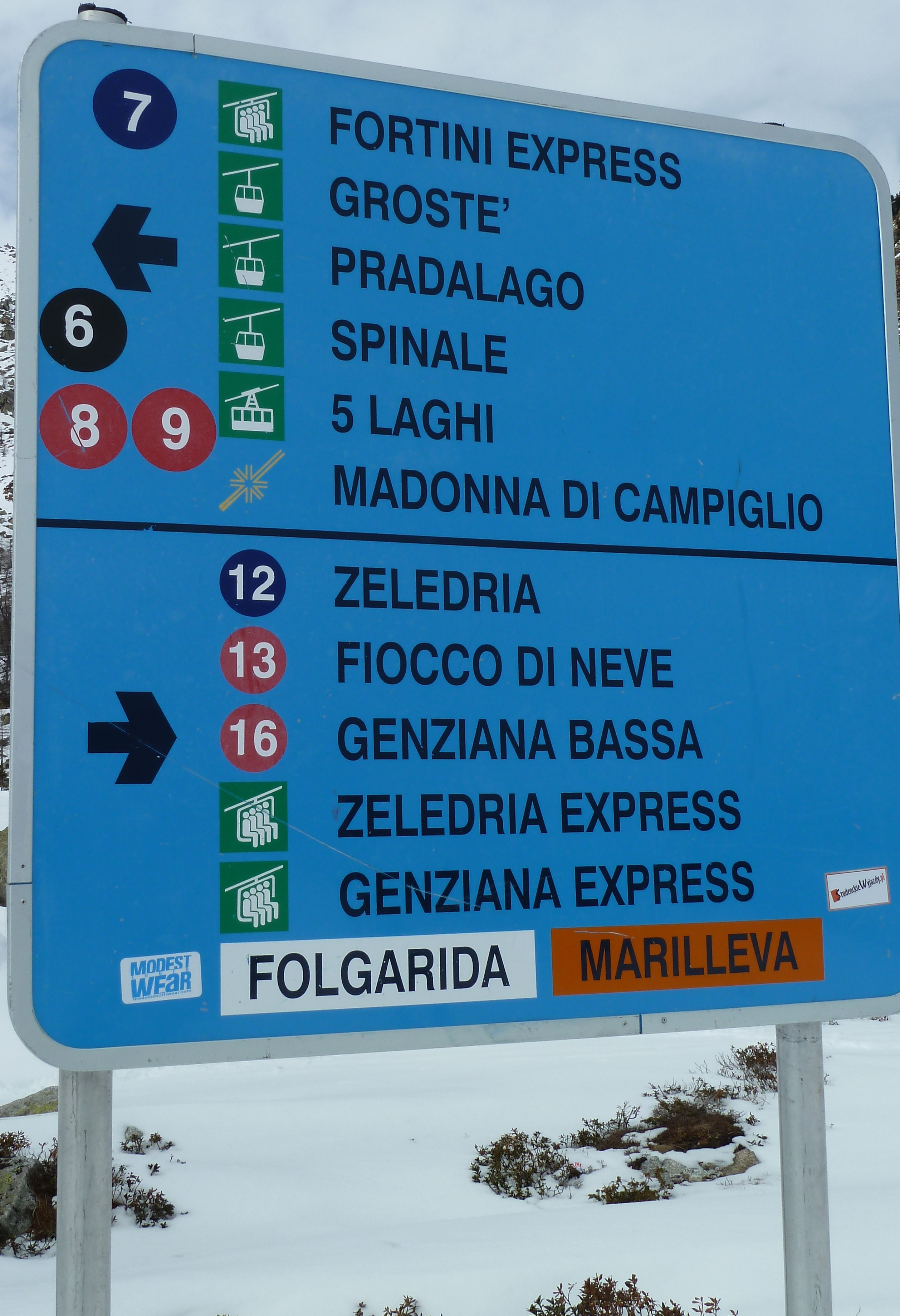 signes routiers ski madonna di campiglio italie